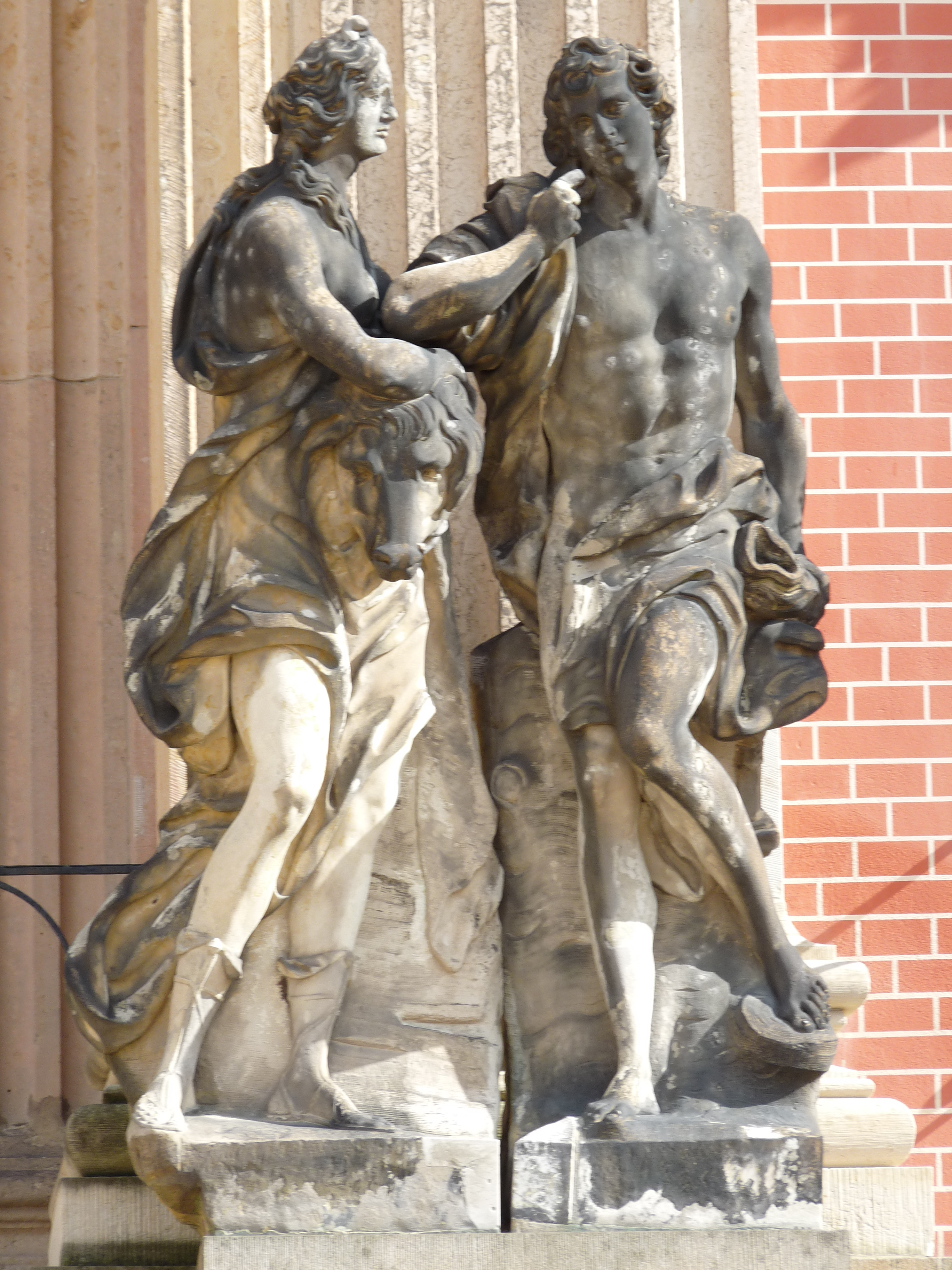 Melager - Meleagros und Atalante - Atalanta Neues Palais Hauptbau Mittelrisalit Westseite Sanssouci